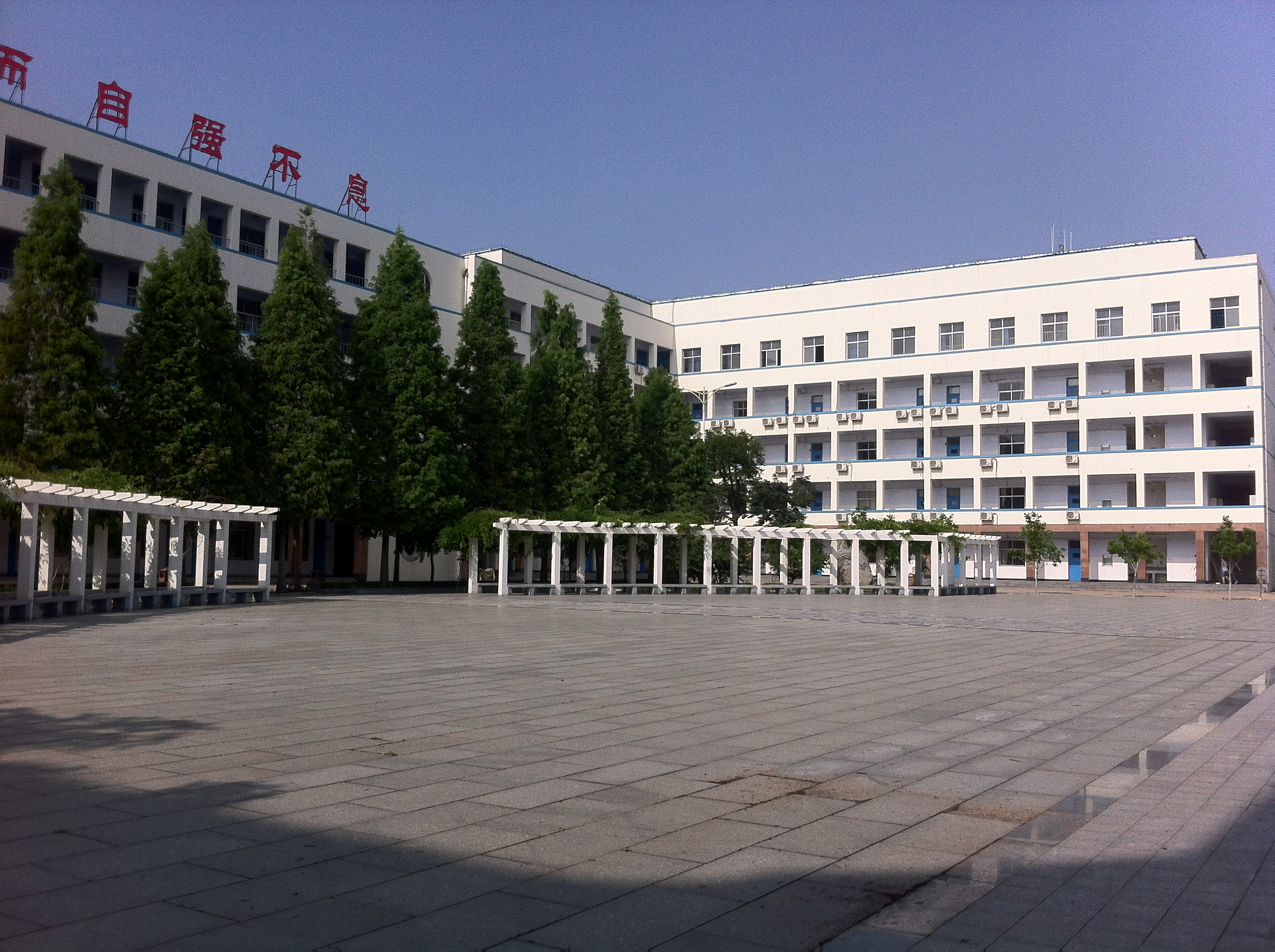 中文（中国大陆）: 山东省泰安第一中学逸夫教学楼东北部分，从萃英广场西南角拍摄